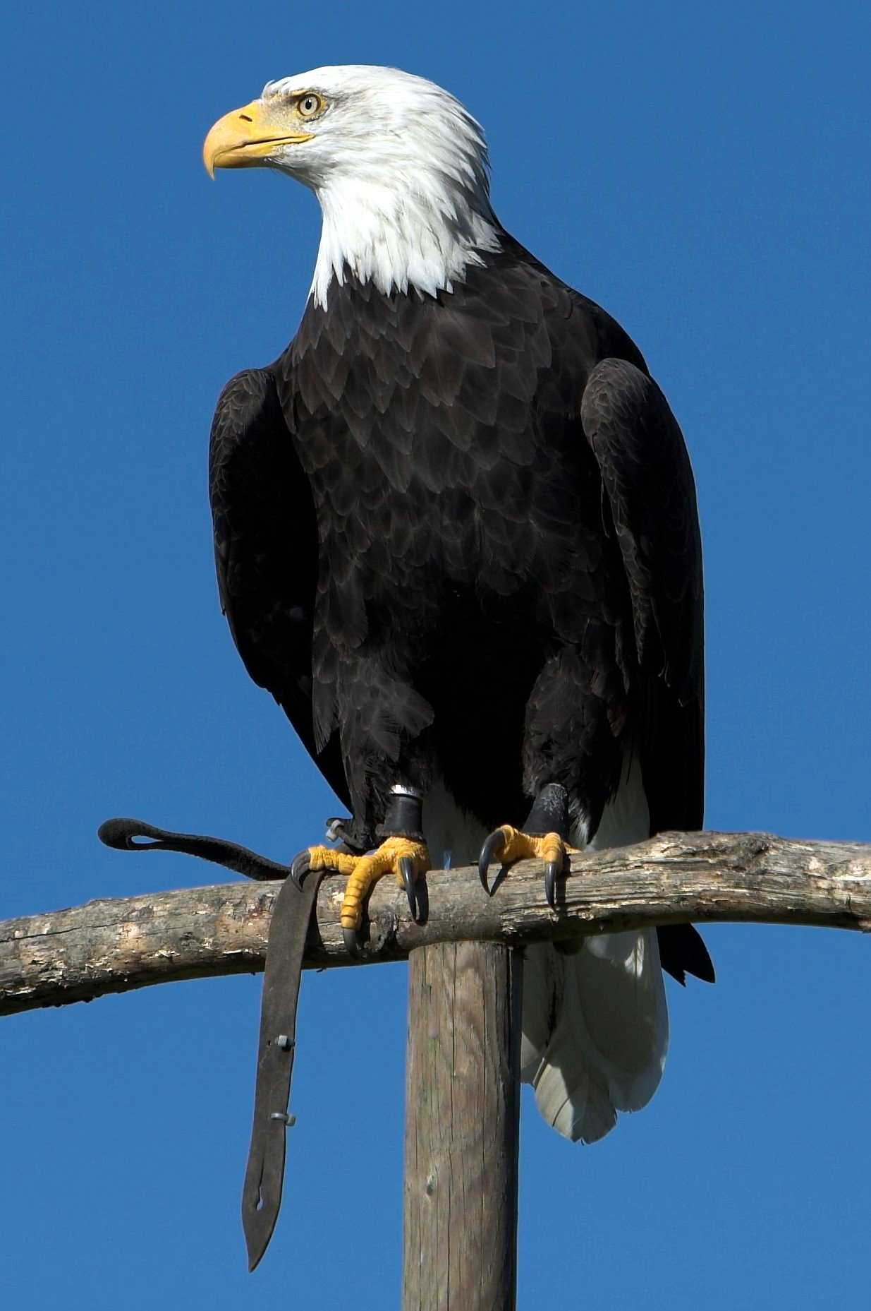 Haliaeetus leucocephalus